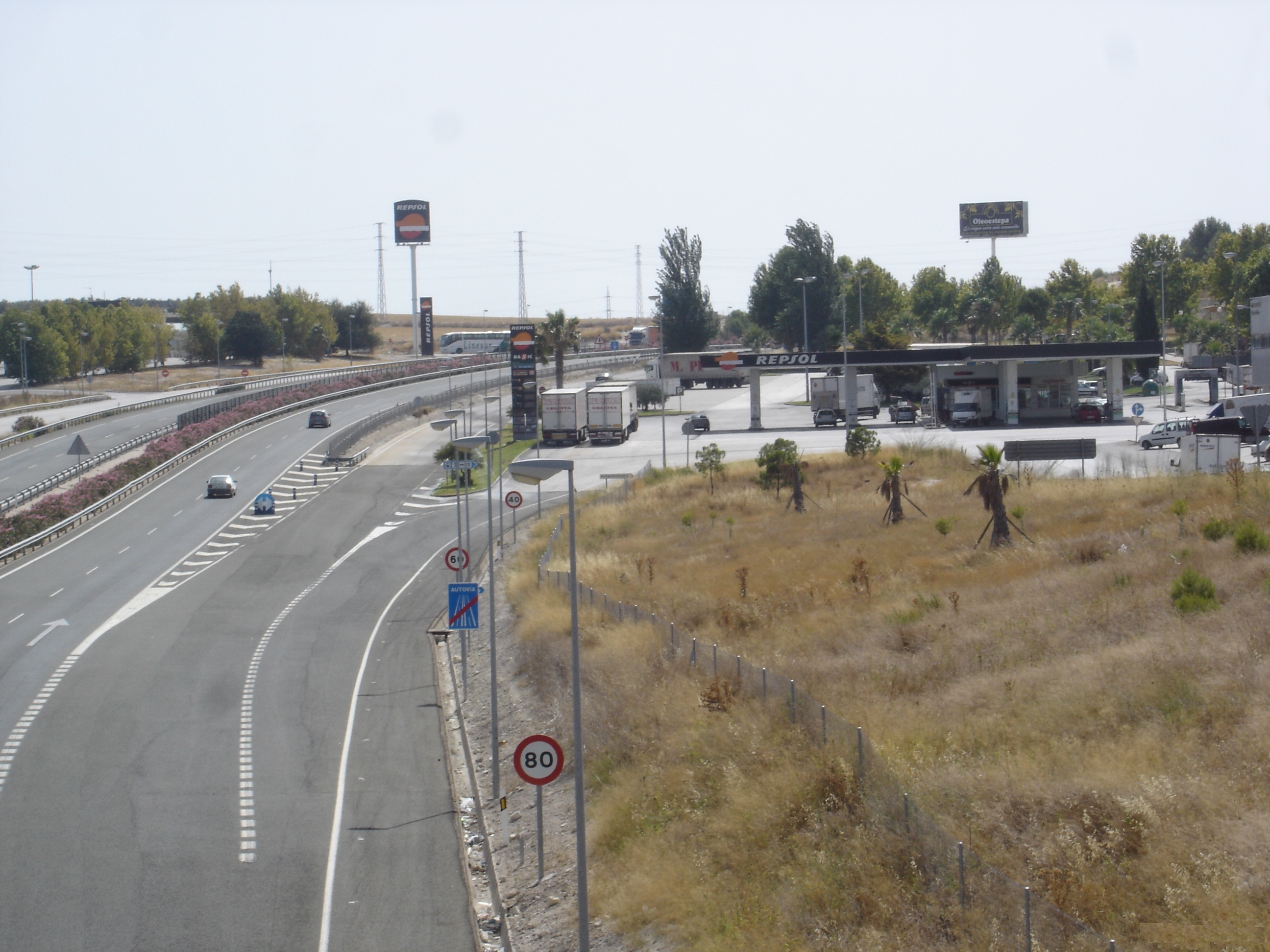 Autovia A-92 por su paso por Estepa (Sevilla)